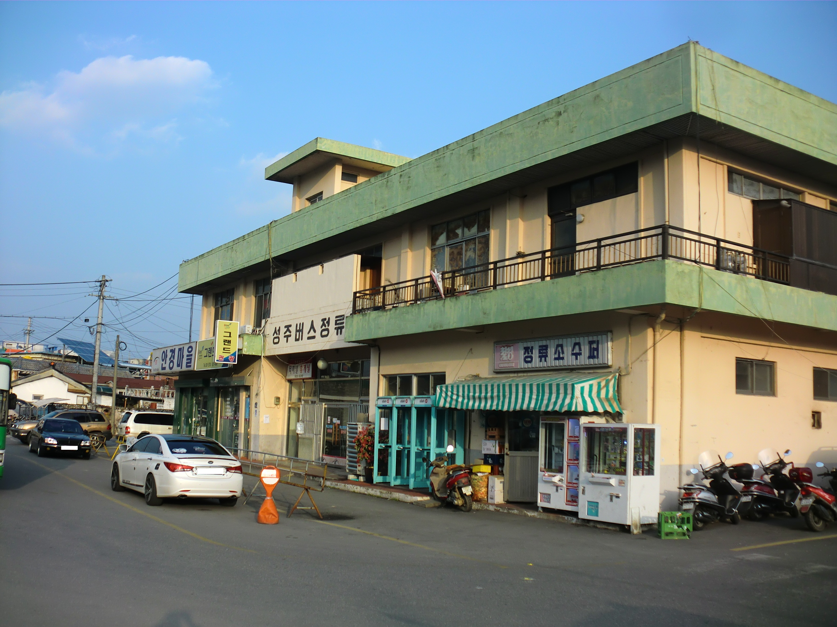 경상북도 성주군에 성주버스정류장